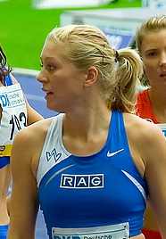 100m B-Lauf ISTAF 2006: Sandra Möller